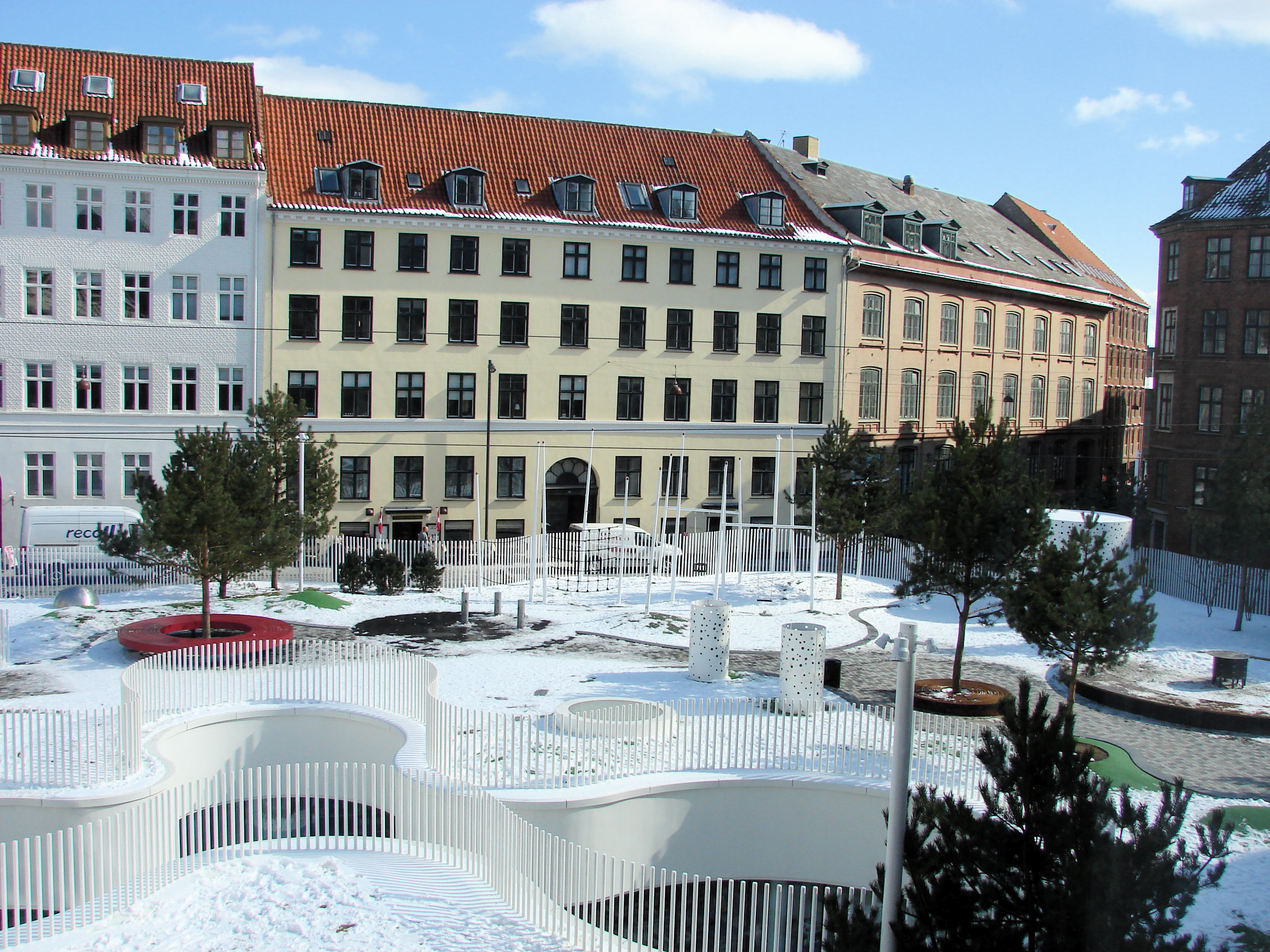 Hauser Plads i København